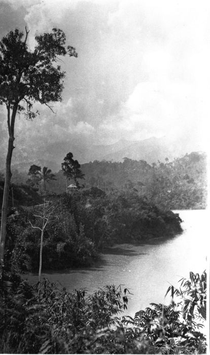 Foto. Het meer van Tas